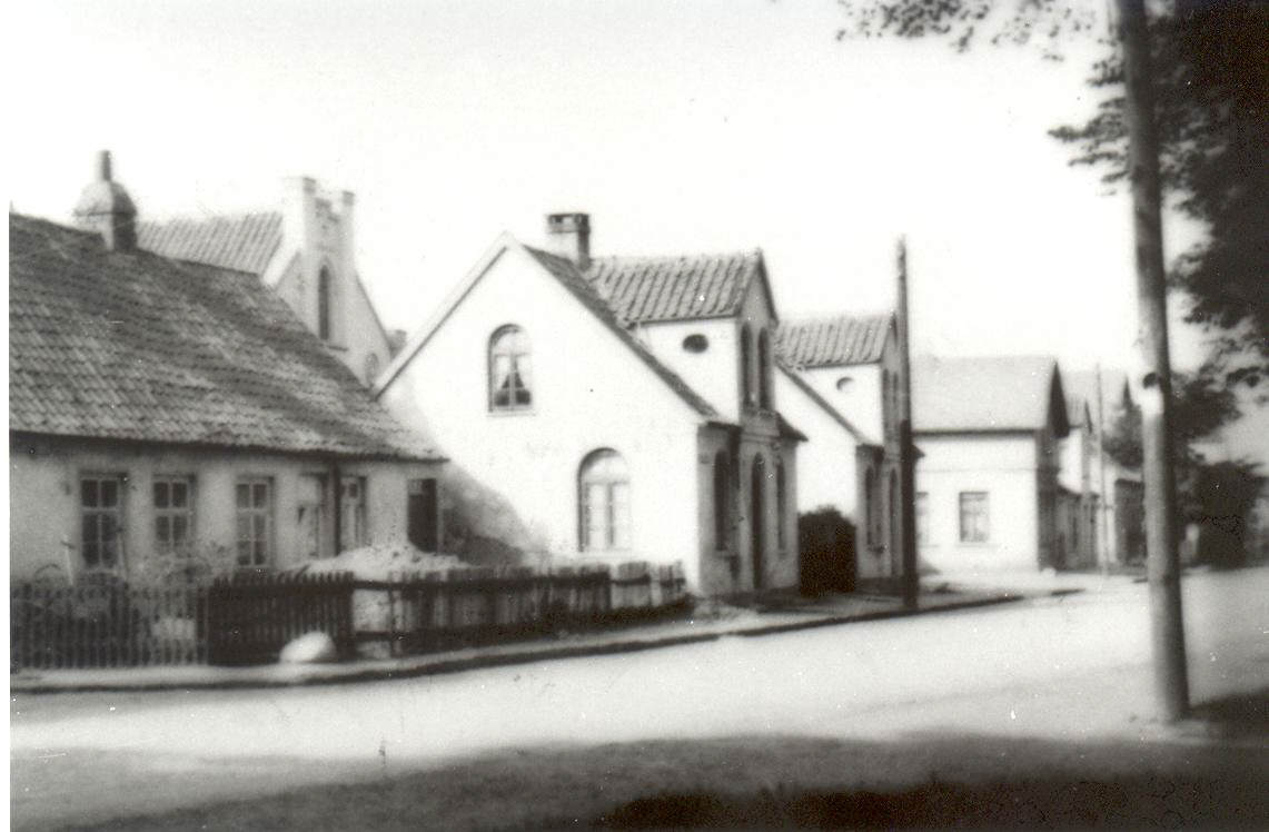 Ehemalige Häuser vor dem Bethaus der Baptisten in Jever